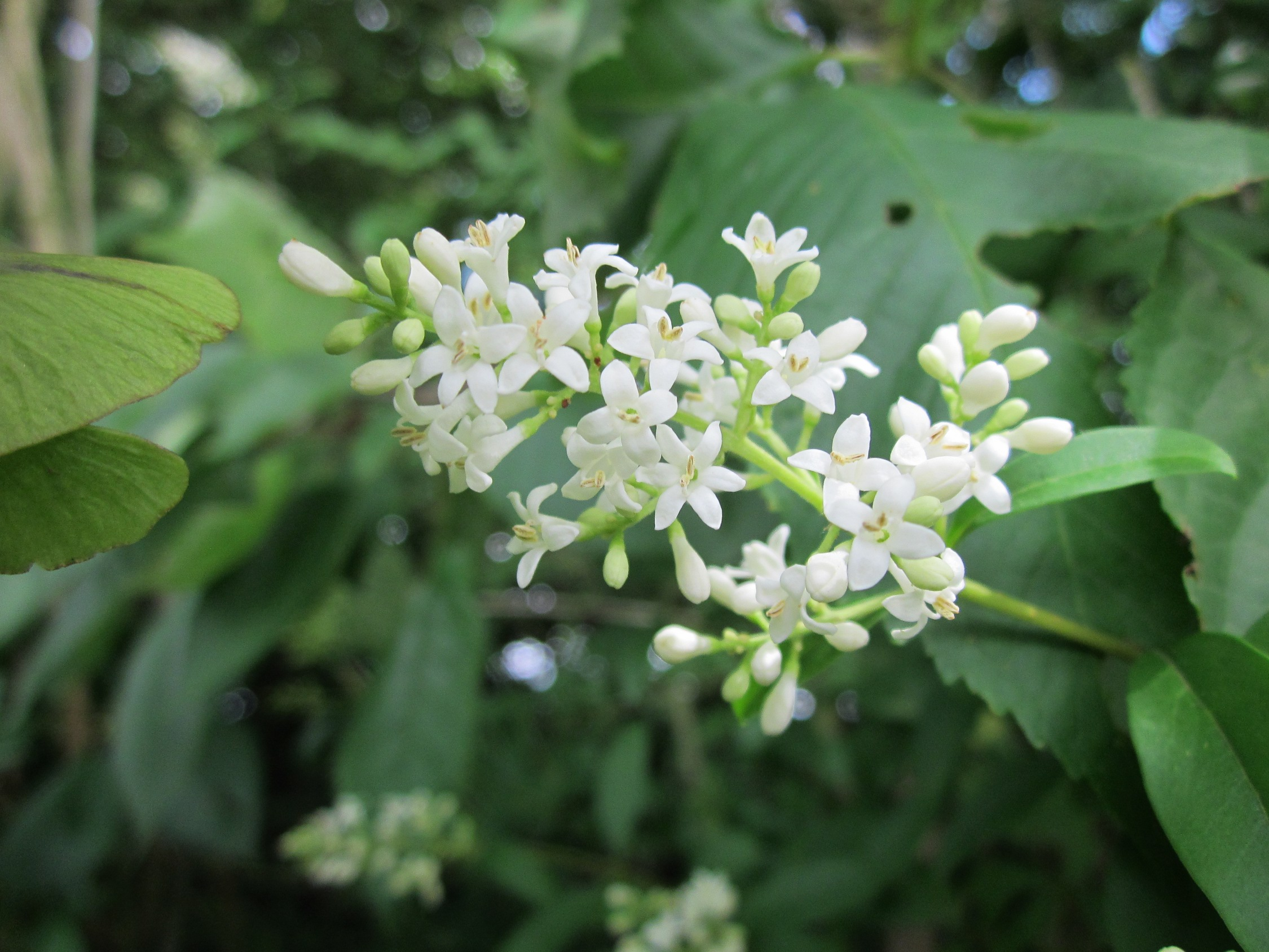 Gewöhnliche Liguster (Ligustrum vulgare) im Hockenheimer Rheinbogen